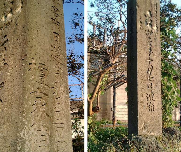 1899年（明治32年）10月7日にこの鉄橋で発生した列車脱線事故の一周忌法要として、日蓮宗妙正寺（宇都宮市）の檀家信徒が建立した慰霊碑。